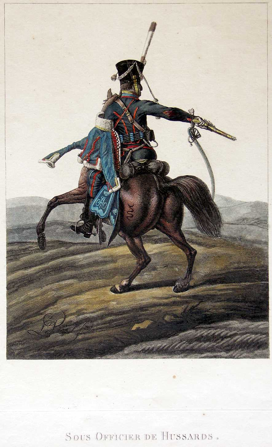 Раскрашенная литография. 21,8X16,2. Автор Л.И. Киль. "Унтер-офицер Павлоградского гусарского полка. 1816.